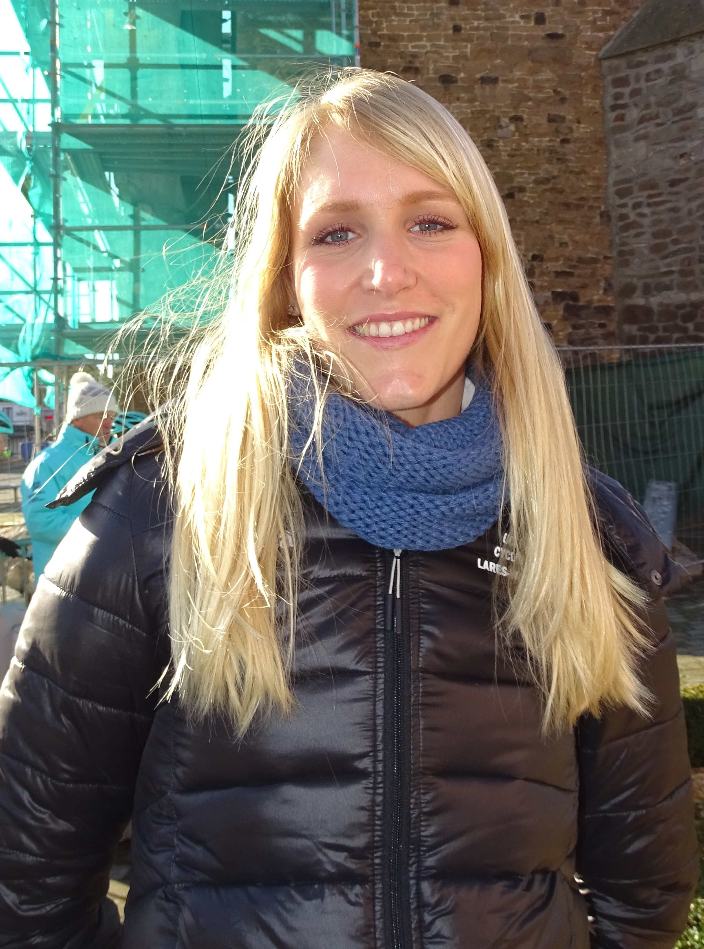 Reportage réalisé le mercredi 2 mars à l'occasion du départ du Samyn des Dames 2016 et du Samyn 2016 à Quaregnon, Belgique.